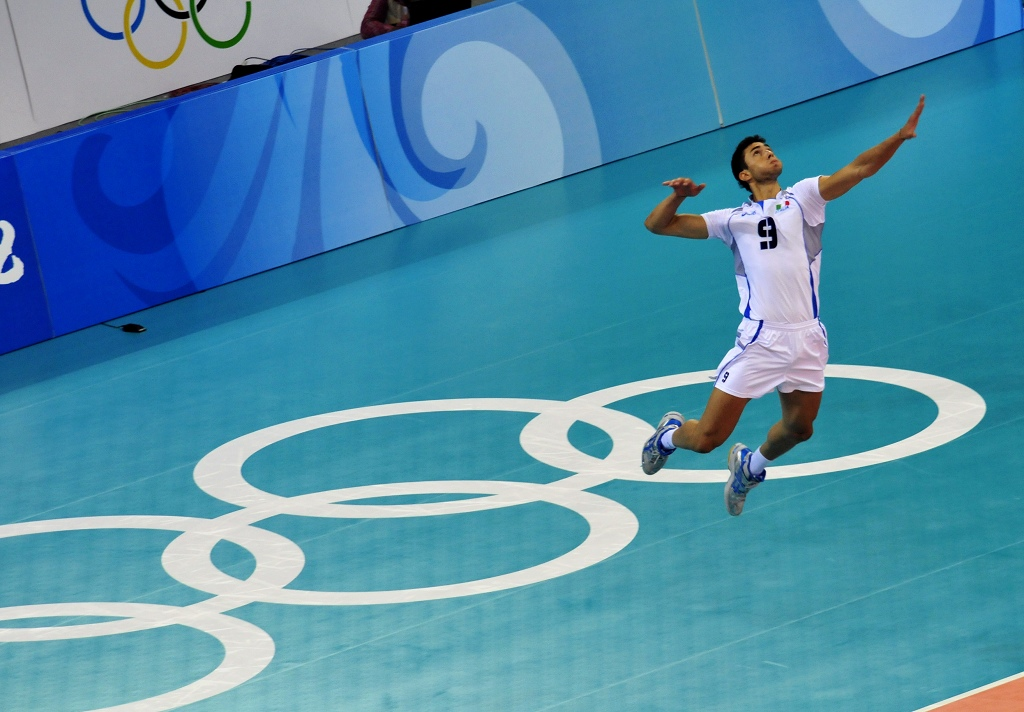 08奥运排球比赛